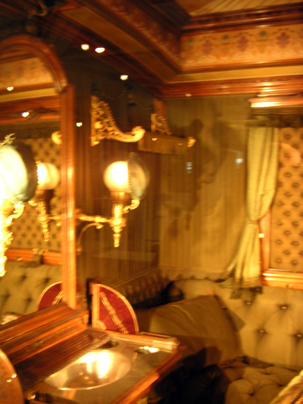 Salonwagen der Kaiserin Elisabeth im Technischen Museum Wien, selbst fotografiert (Fotoerlaubnis) Juli 2005, Unschärfen und Reflexionen aufgrund der Aufnahme von außen durch die Wagenscheibe